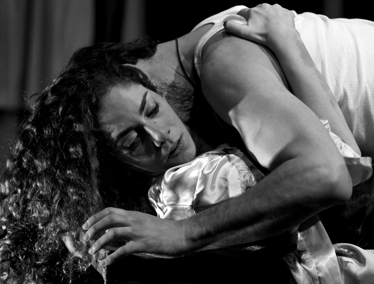 שרון דנון בהצגה יצרים בתיאטרון הסימטה, 2013